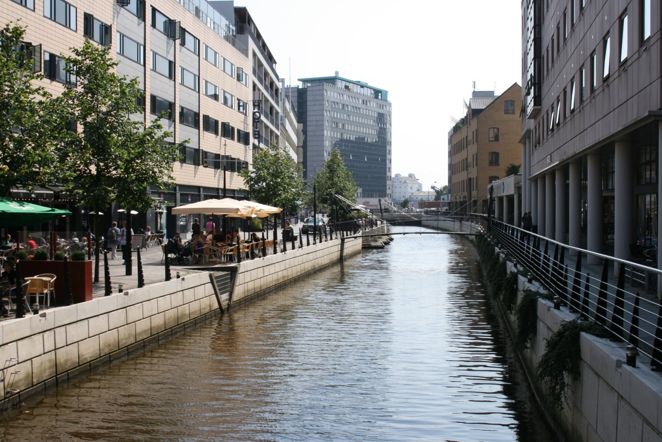 Århus Å ved Åboulevarden i Århus.